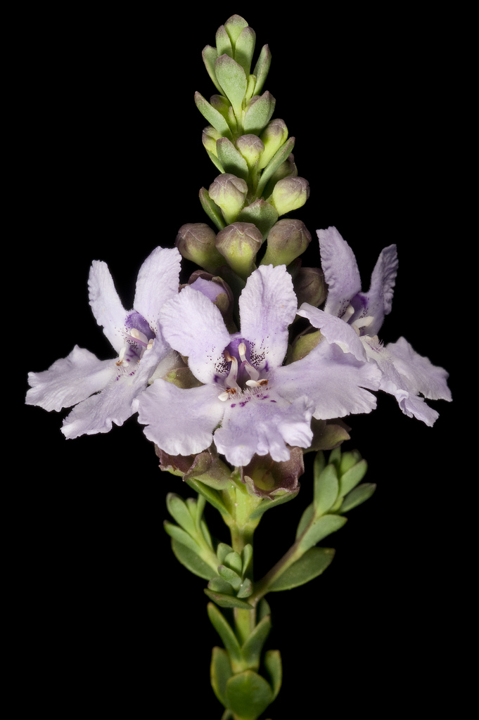 Microcorys sp.